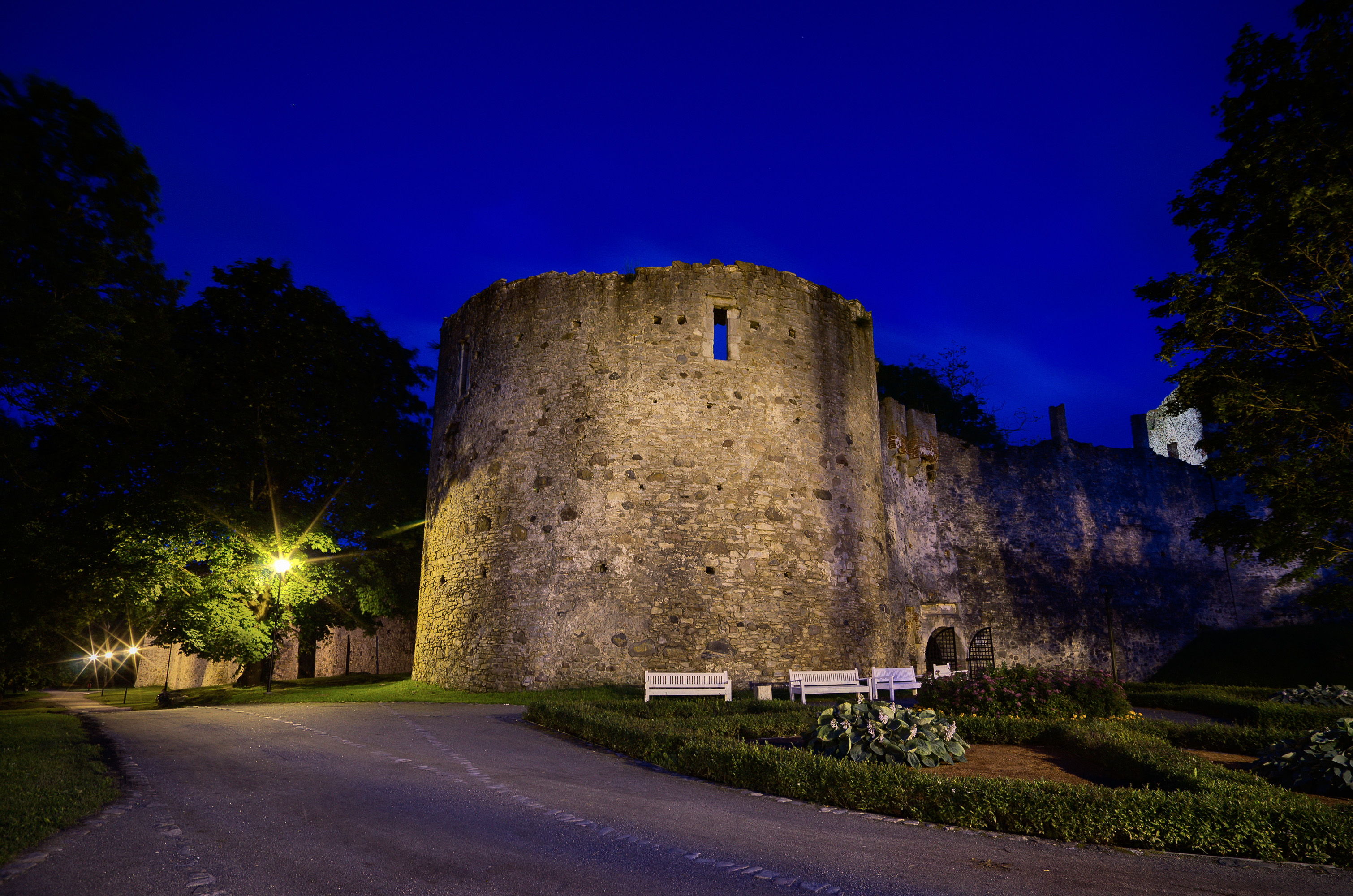 Haapsalu piiskopilinnuse varemed.